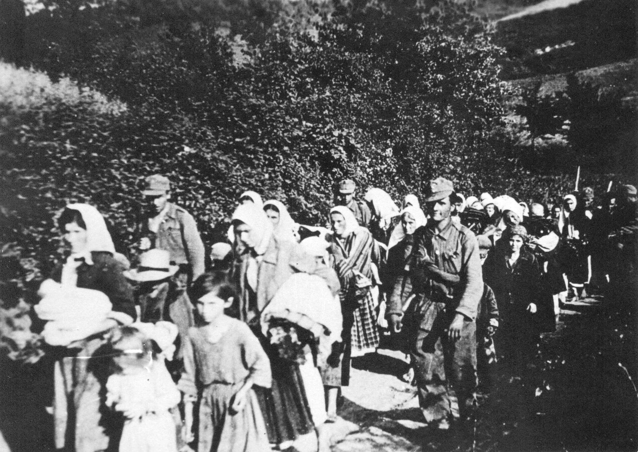 Srpskohrvatski / српскохрватски: Ustaše odvode narod posle ofanzive na Kozaru (kod Bosanske Dubice) juna 1942.